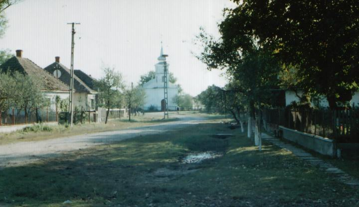 Érmindszent látképe a szülőház udvarából